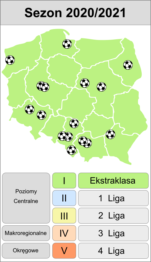 Kluby występujące w ekstraklasie w sezonie 2020/21